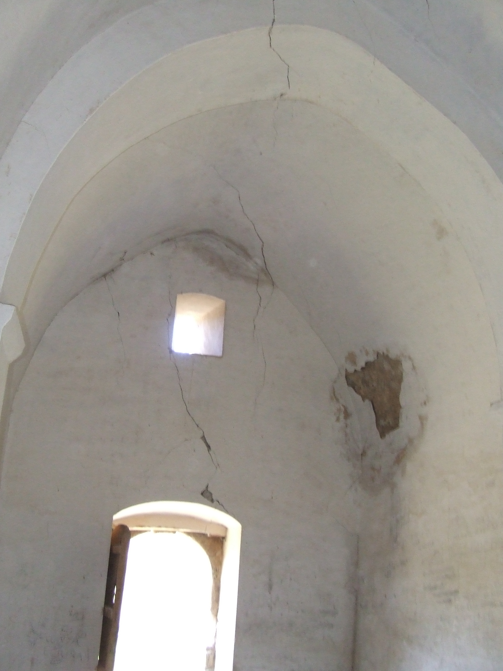 Interior de Sant Serni de Montesquiu (Orcau, Isona i Conca Dellà, Pallars Jussà)